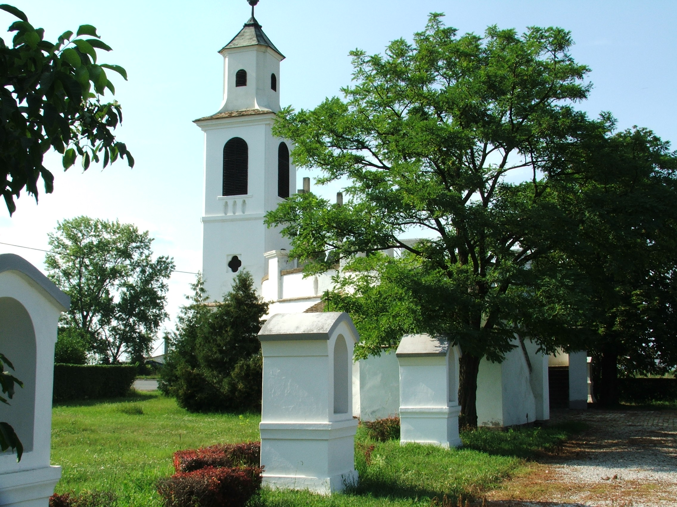 Kálvária és kápolna, 56-os számú főút mellett (, )